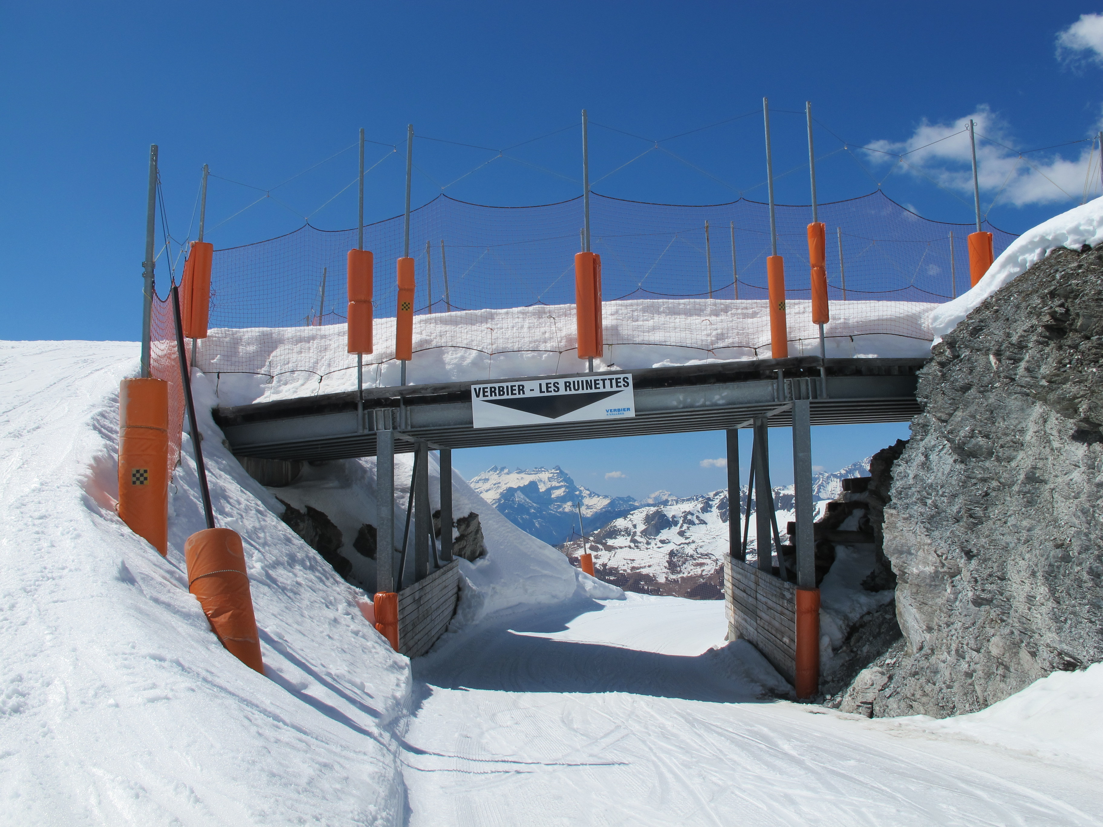 Skibrücke in Skigebiet Verbier.